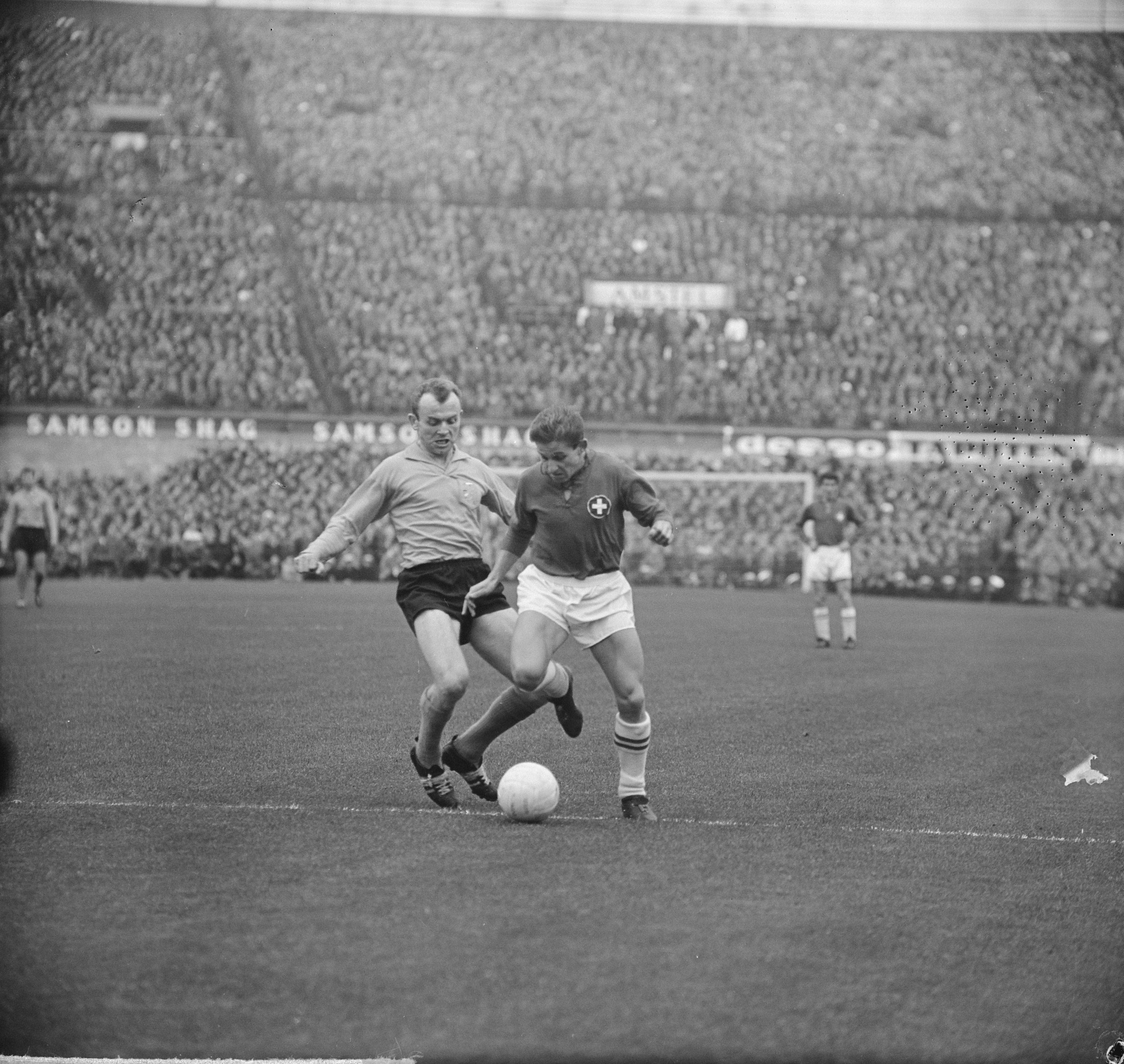 Collectie / Archief : Fotocollectie Anefo Reportage / Serie : [ onbekend ] Beschrijving : Nederland tegen Zwitserland 3-1, Van Wissen in duel met Pottier Datum : 11 november 1962 Trefwoorden : duels Fotograaf : Nijs, Jac. de / Anefo Auteursrechthebbende : Nationaal Archief Materiaalsoort : Negatief (zwart/wit) Nummer archiefinventaris : bekijk toegang 2.24.01.03 Bestanddeelnummer : 914-4991